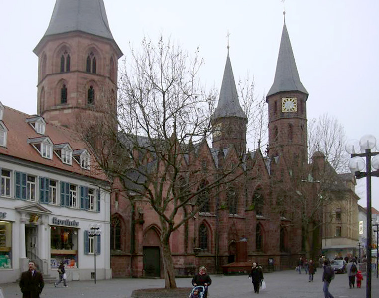 Stiftskirche in Kaiserslautern